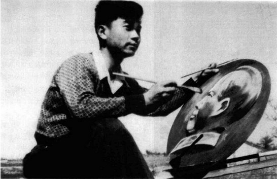 就读大学时期的彭一刚